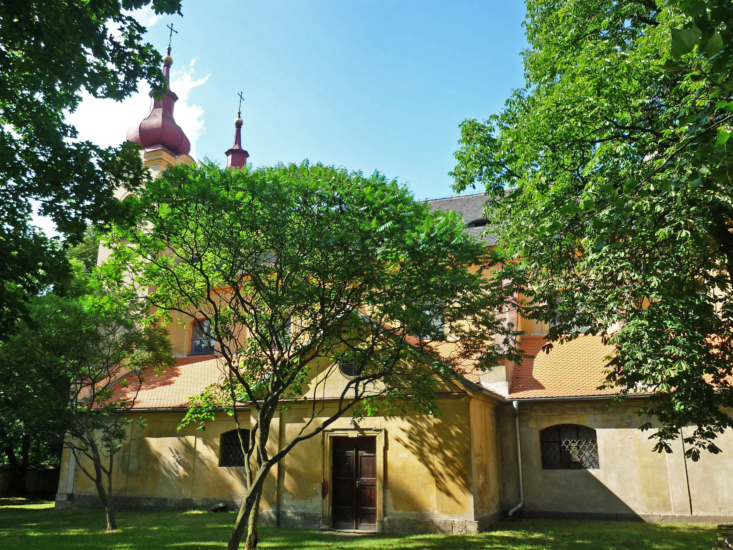 Kirche in Schwaz / Světec in Böhmen